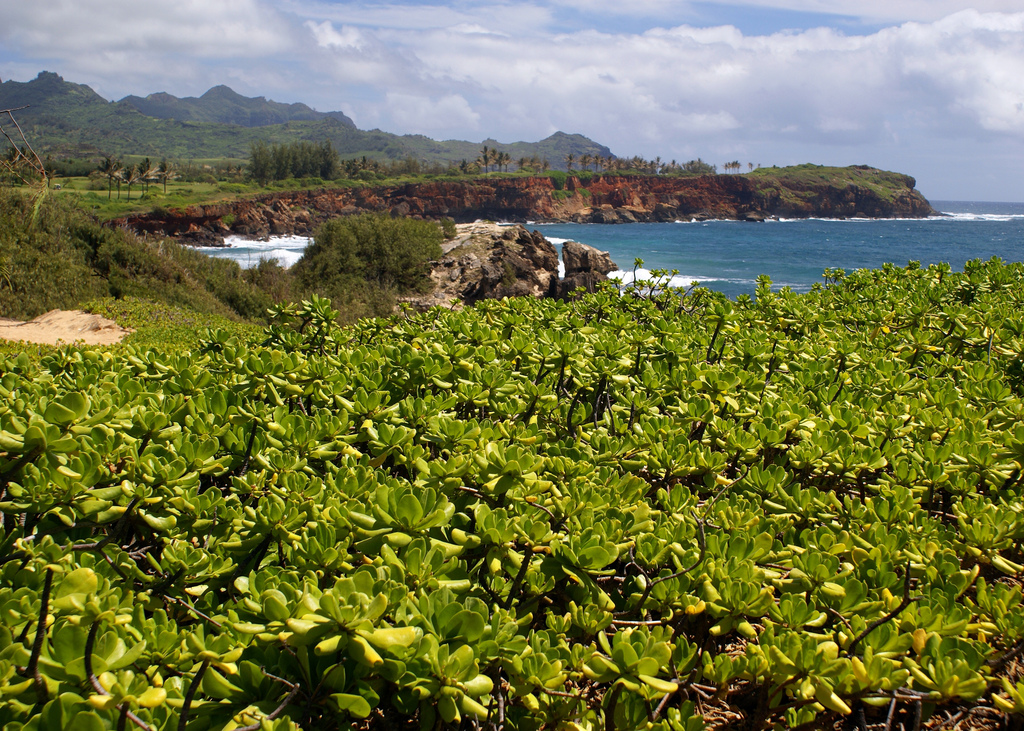 Maha'ulepu Trail--Looking Toward Punahoa Point